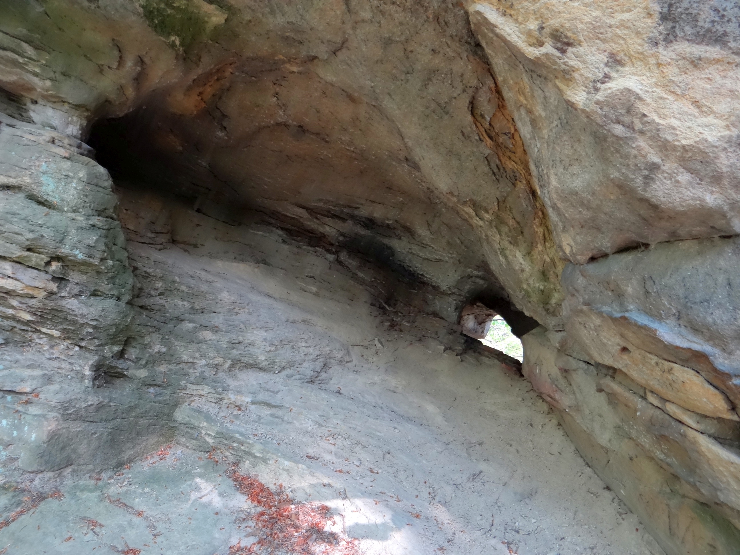 Schronisko w Grzybku